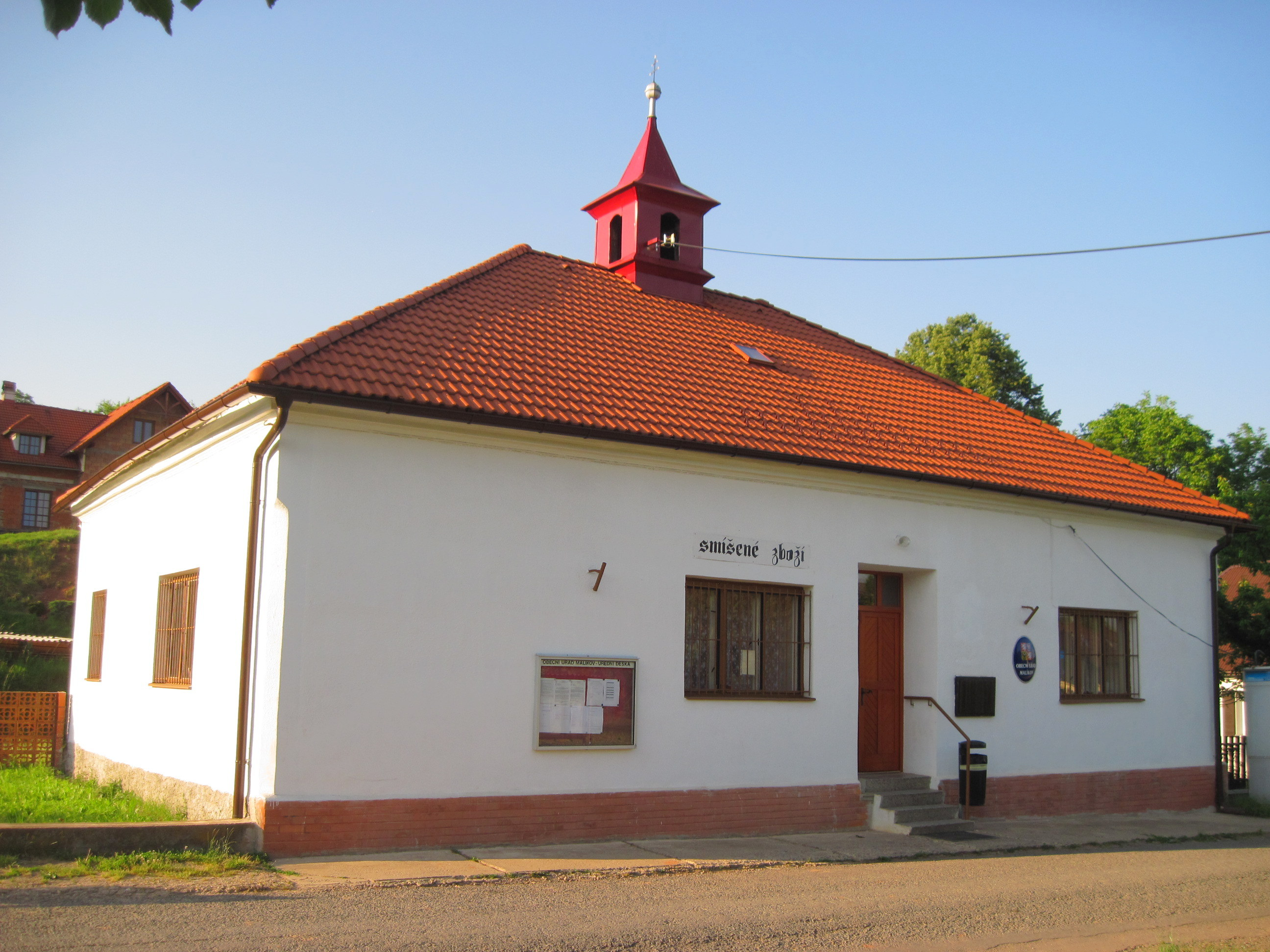 obecní úřad